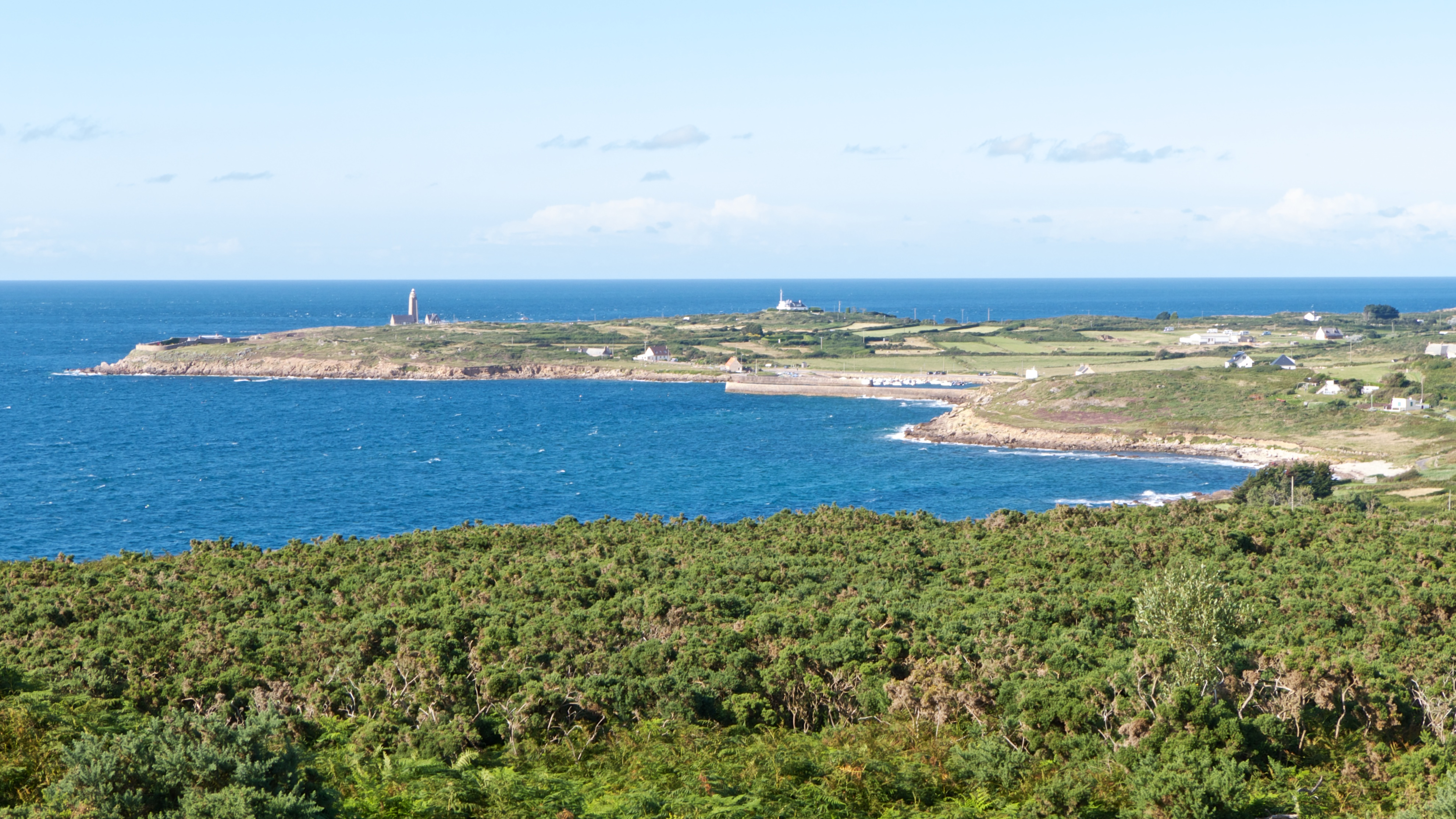 Cap Lévi, Normandie, France